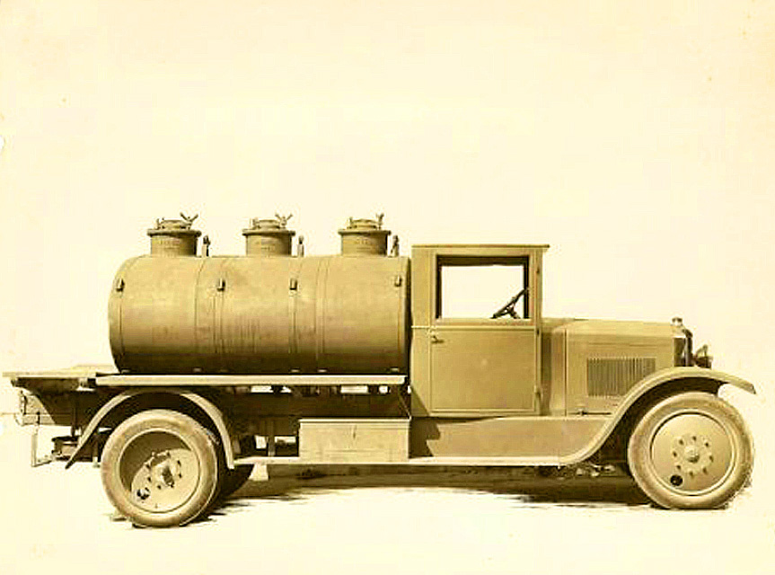 Camion pinardier construit par Rochet Schneider en 1912